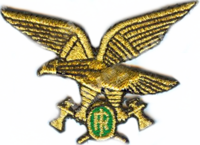 Fregio per berretto rigido del Corpo Forestale e di V.A. della Regione Sardegna e della Regione Sicilia